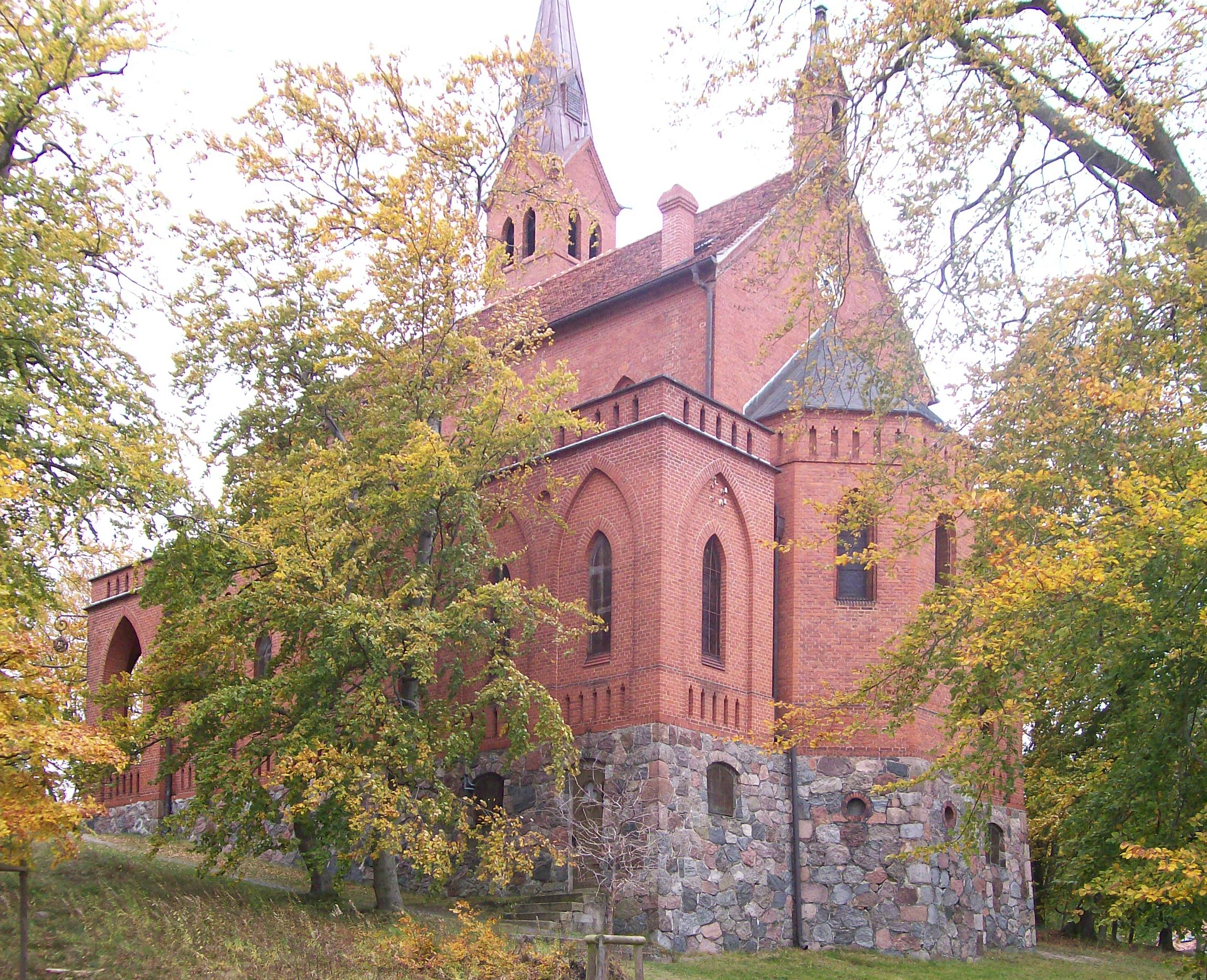 Kirche im Walde in Heringsdorf, gebaut 1848